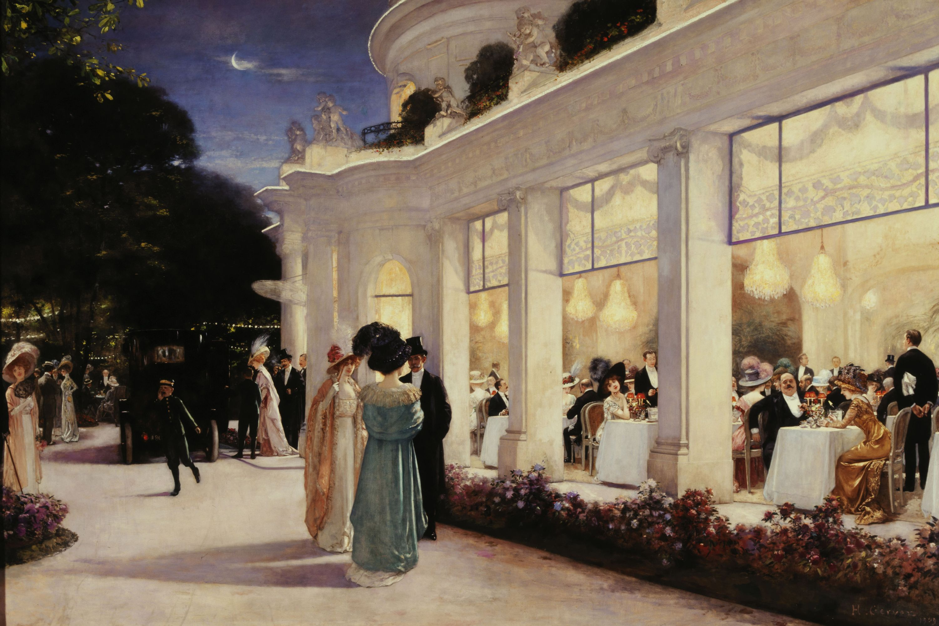 Une soirée mondaine au restaurant "le Pré Catalan"